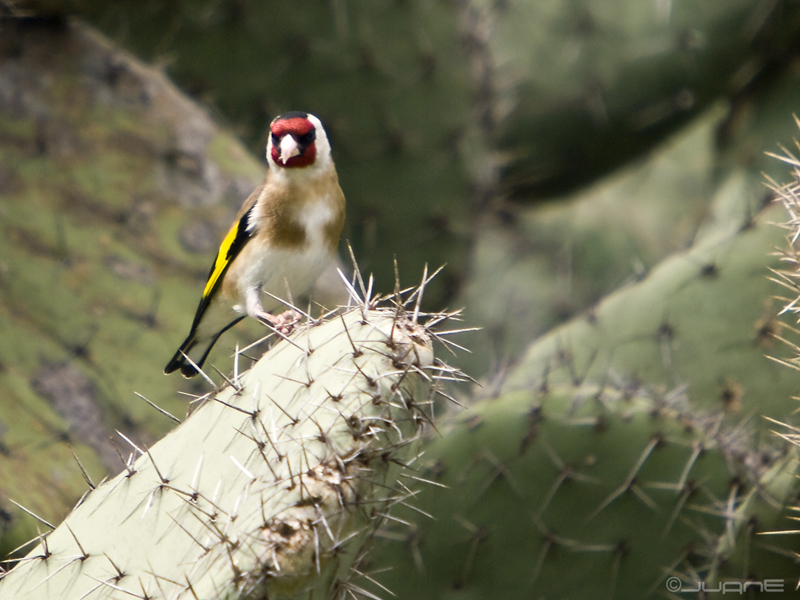 Jilguero (carduelis carduelis parva)